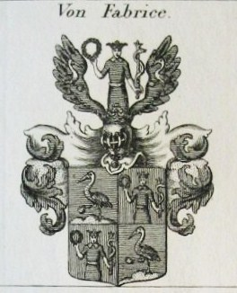 Wappen derer v. Fabrice, wie es dem Stammvater, dem kaiserlichen Reichshofratsagenten Andreas Gottlieb Fabricius am 4. September 1731 in Wien bei der Erhebung in den Rittermäßigen Reichsadelstand verliehen wurde. Vorbild war ein bereits 1660 auf einem Kupferstich abgebildetes Wappen des kaiserlichen Hofpfalzgrafen Johann Georg Fabricius (* 1593; † 1668), Doktor der Philosophie und der Medizin.